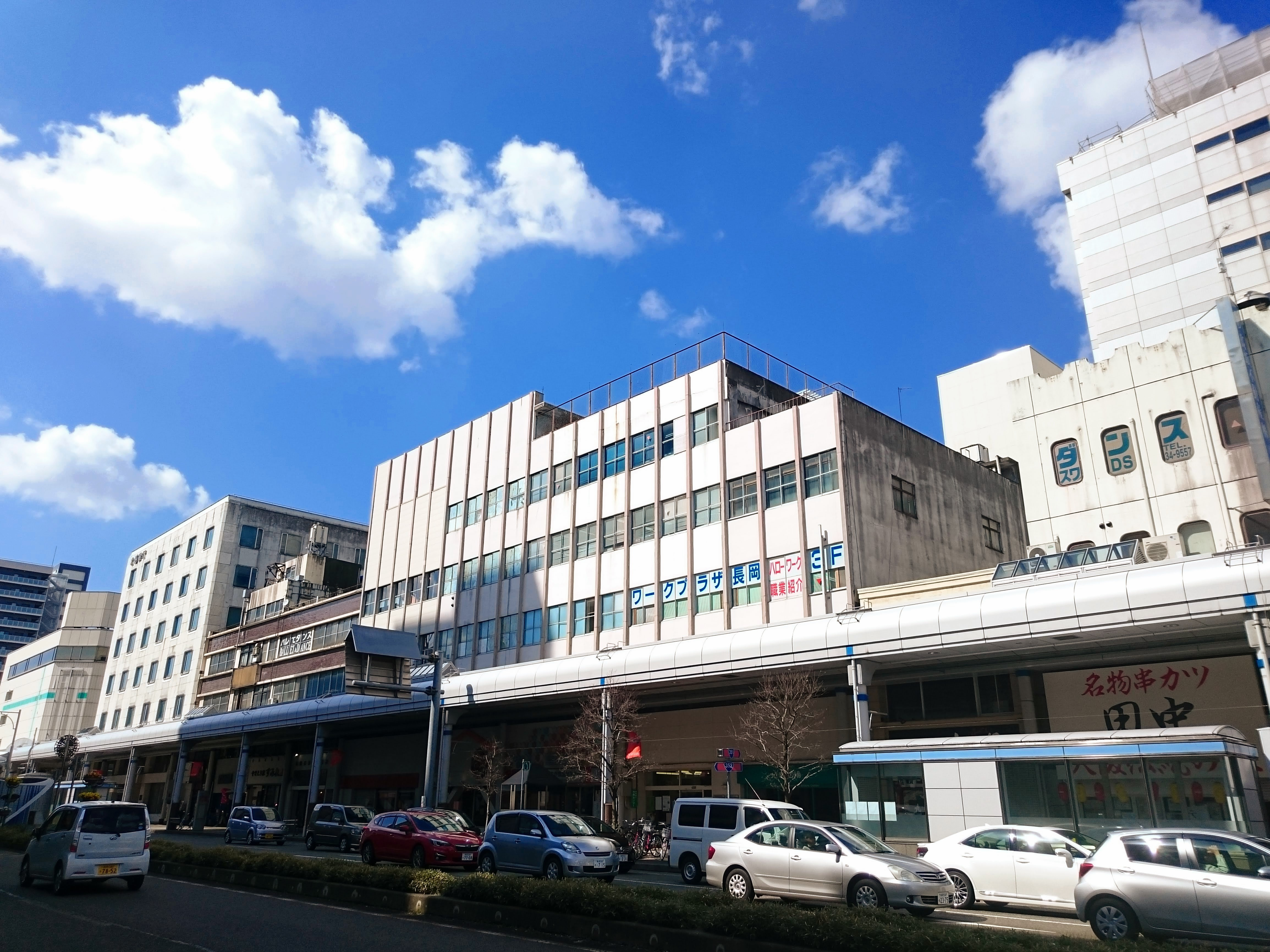 ながおか市民センター（株式会社丸大が所有）